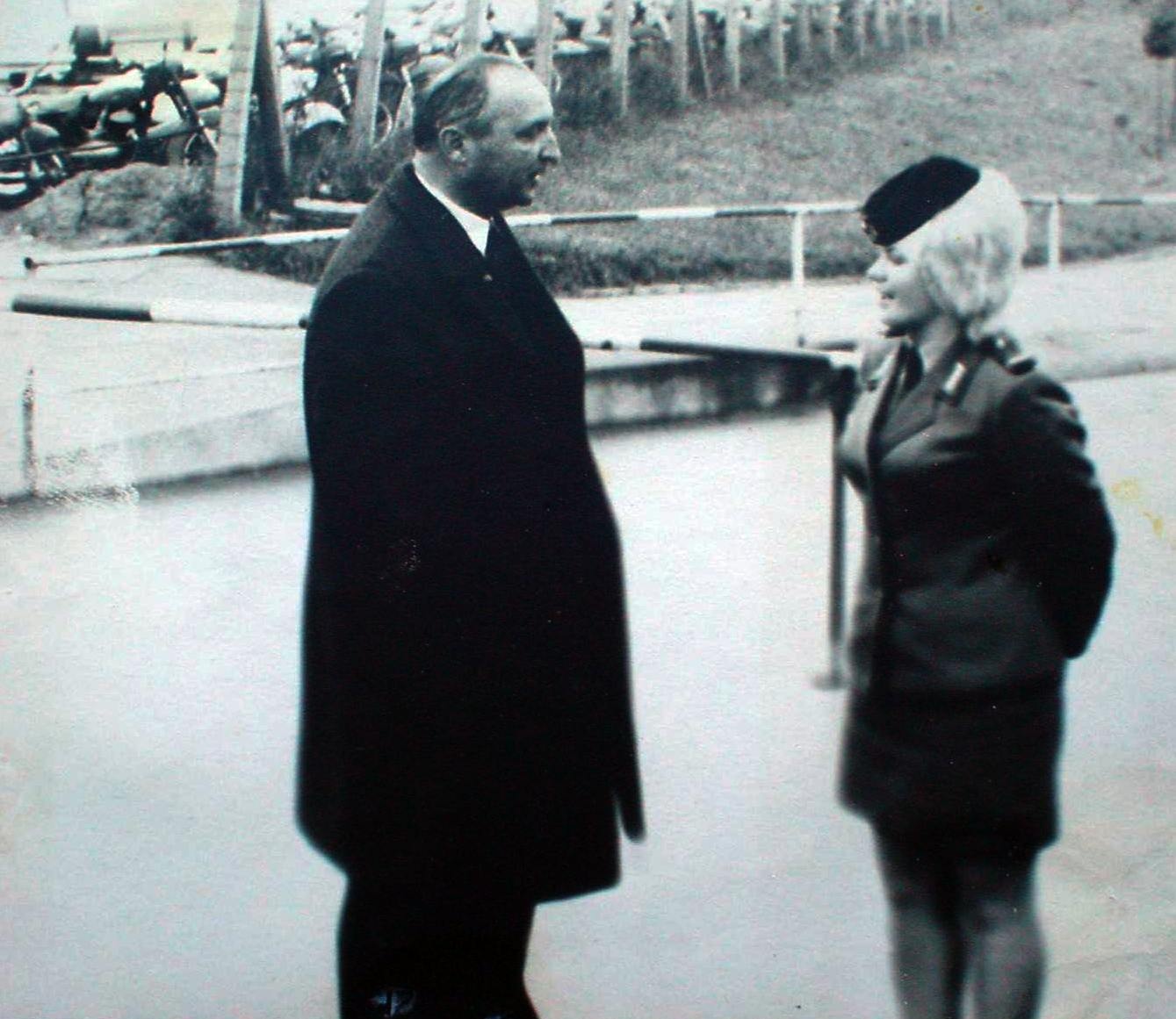 Писатель И.М. Бондаренко на месте бывшего авиазавода Хейнкеля "Мариине", Германия. 1973.